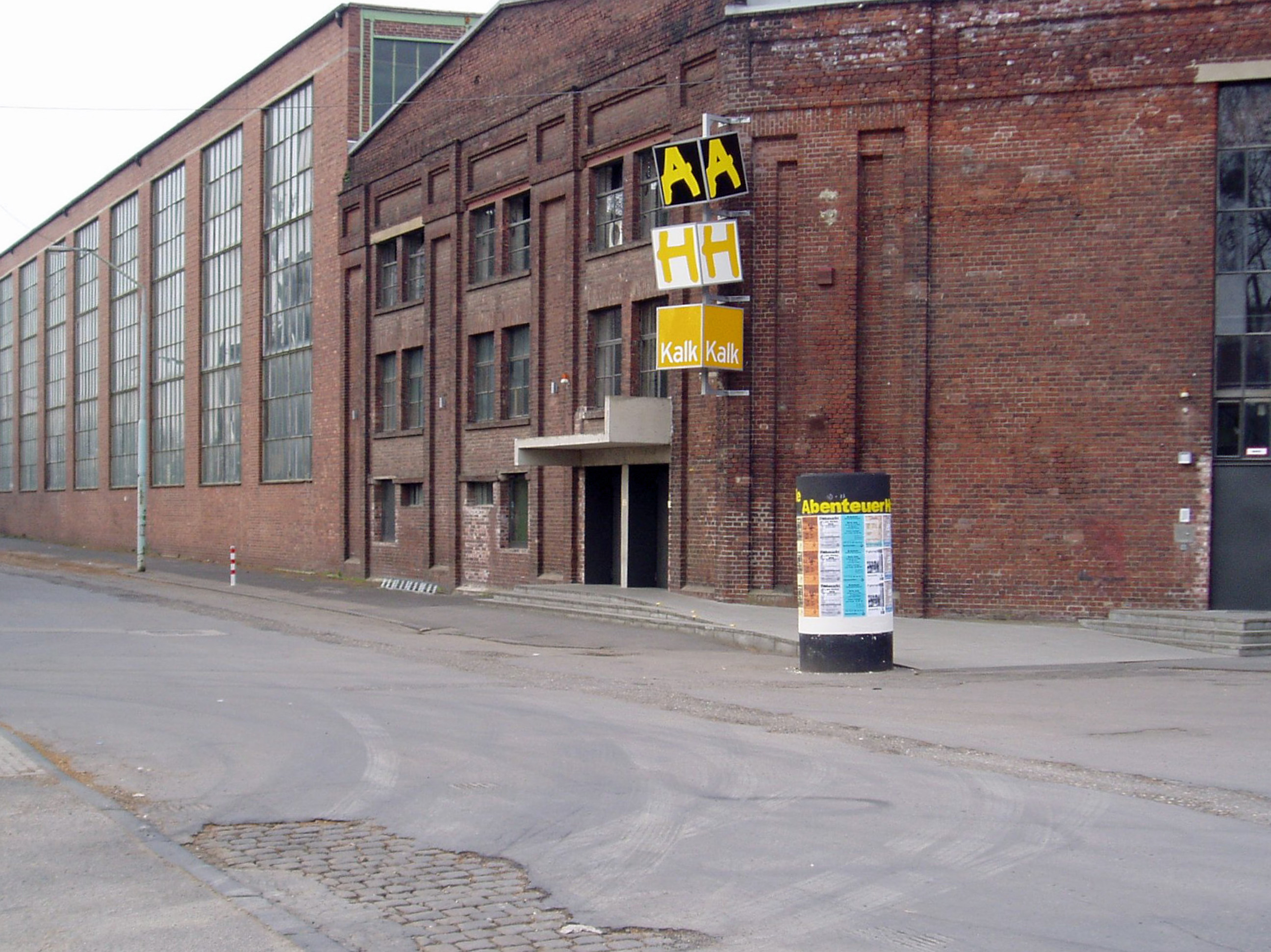 Köln-Kalk - Abenteuerhalle